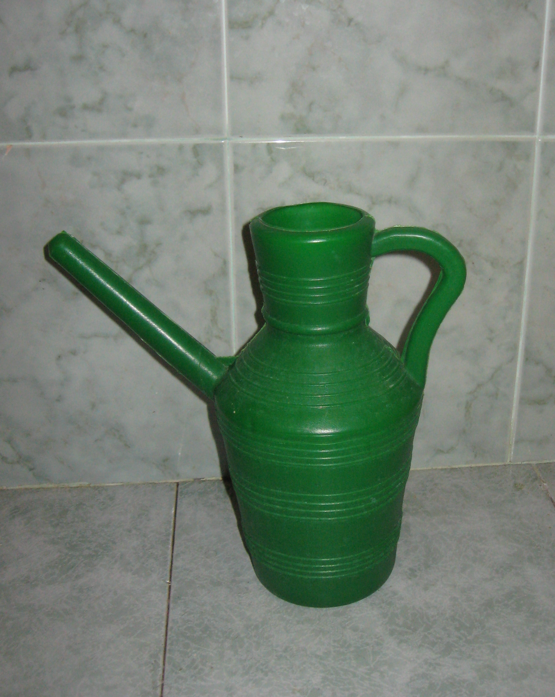 Aftafa